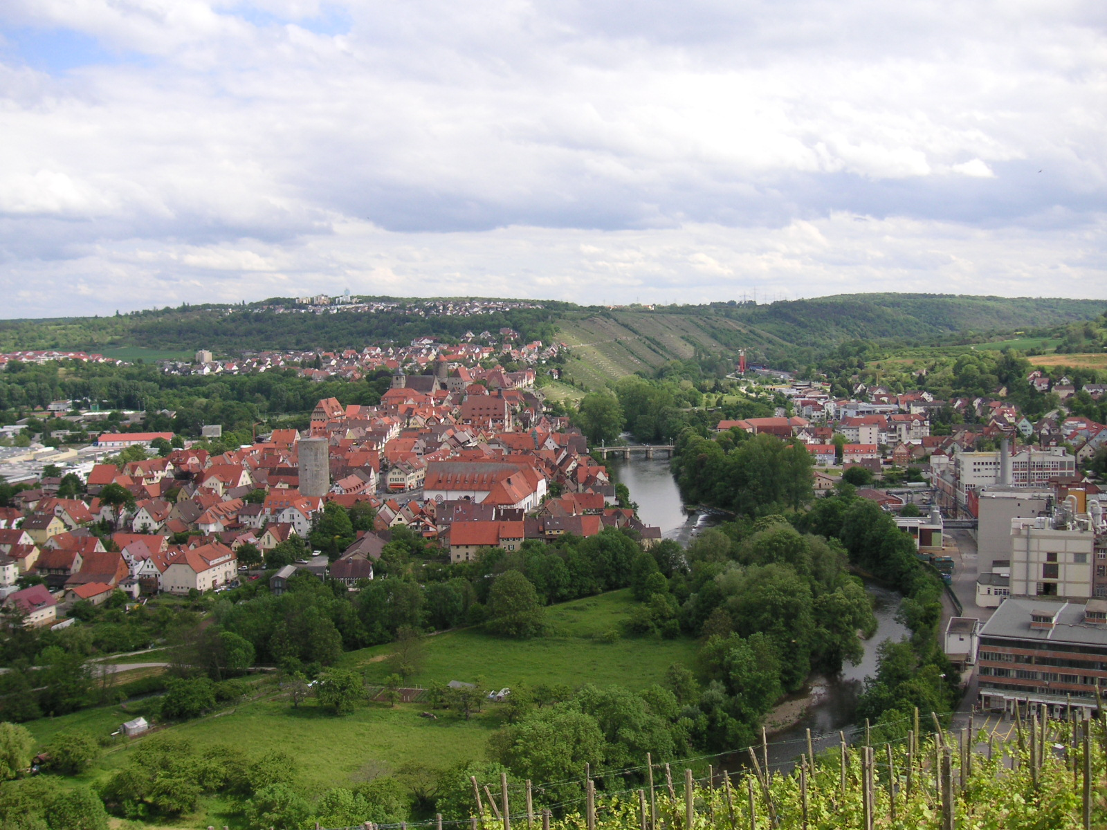 Panorama von Besigheim